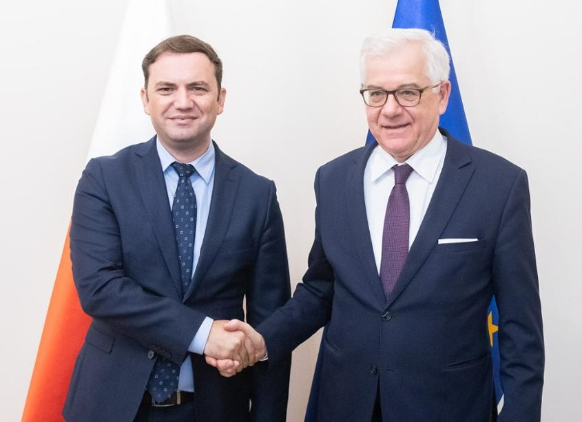 Robocza wizyta w Polsce macedońskiego wicepremiera Bujara Osmaniego u ministra spraw zagranicznych Jacka Czaputowicza